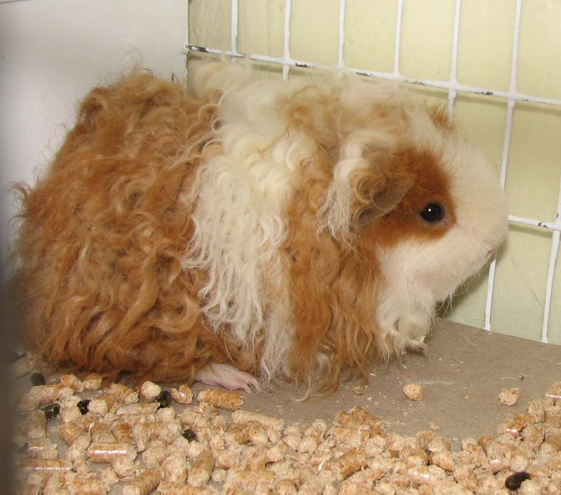 A Texel guinea pig.